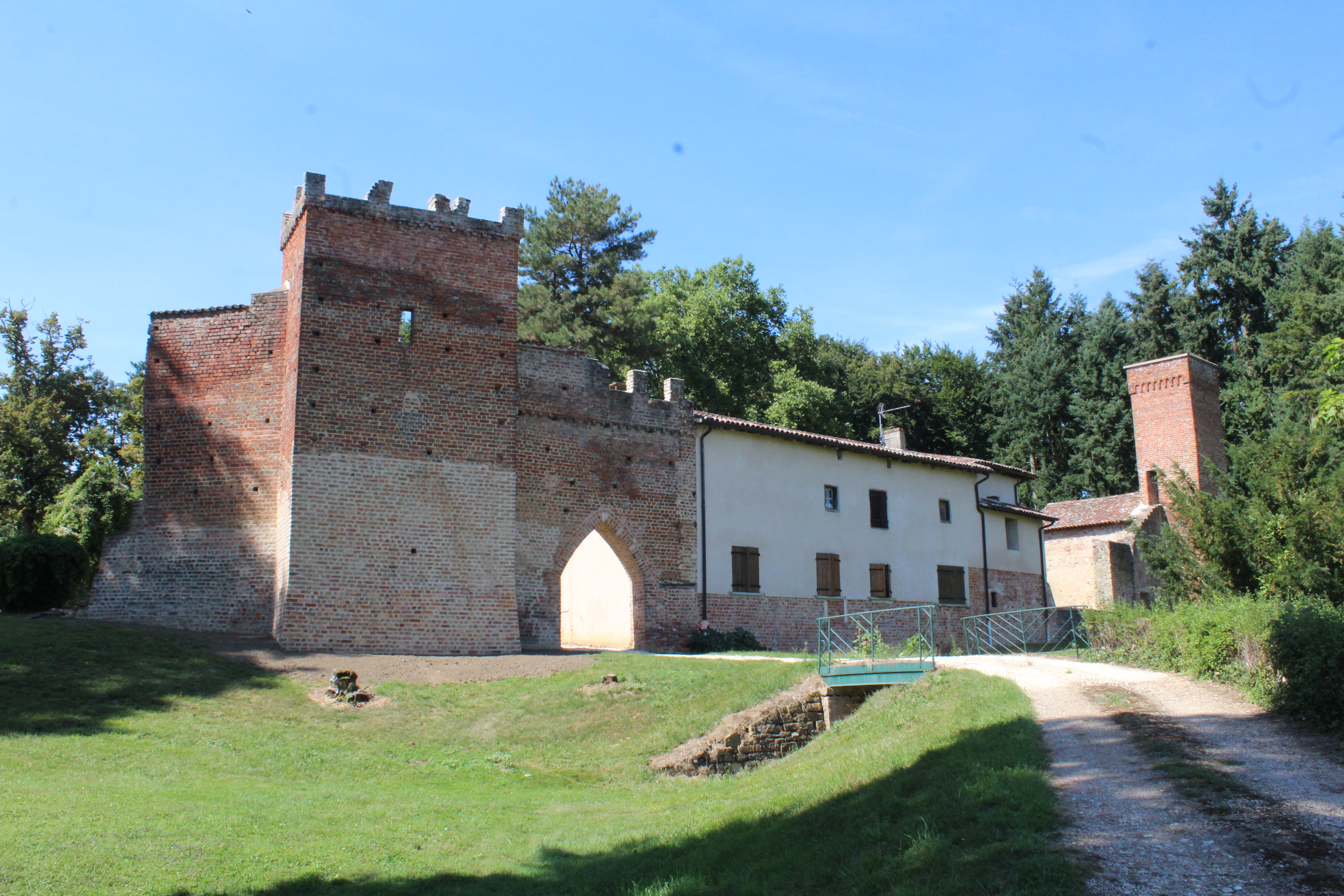 Site médiéval du Vieux Bourg de L'Abergement-Clémenciat.